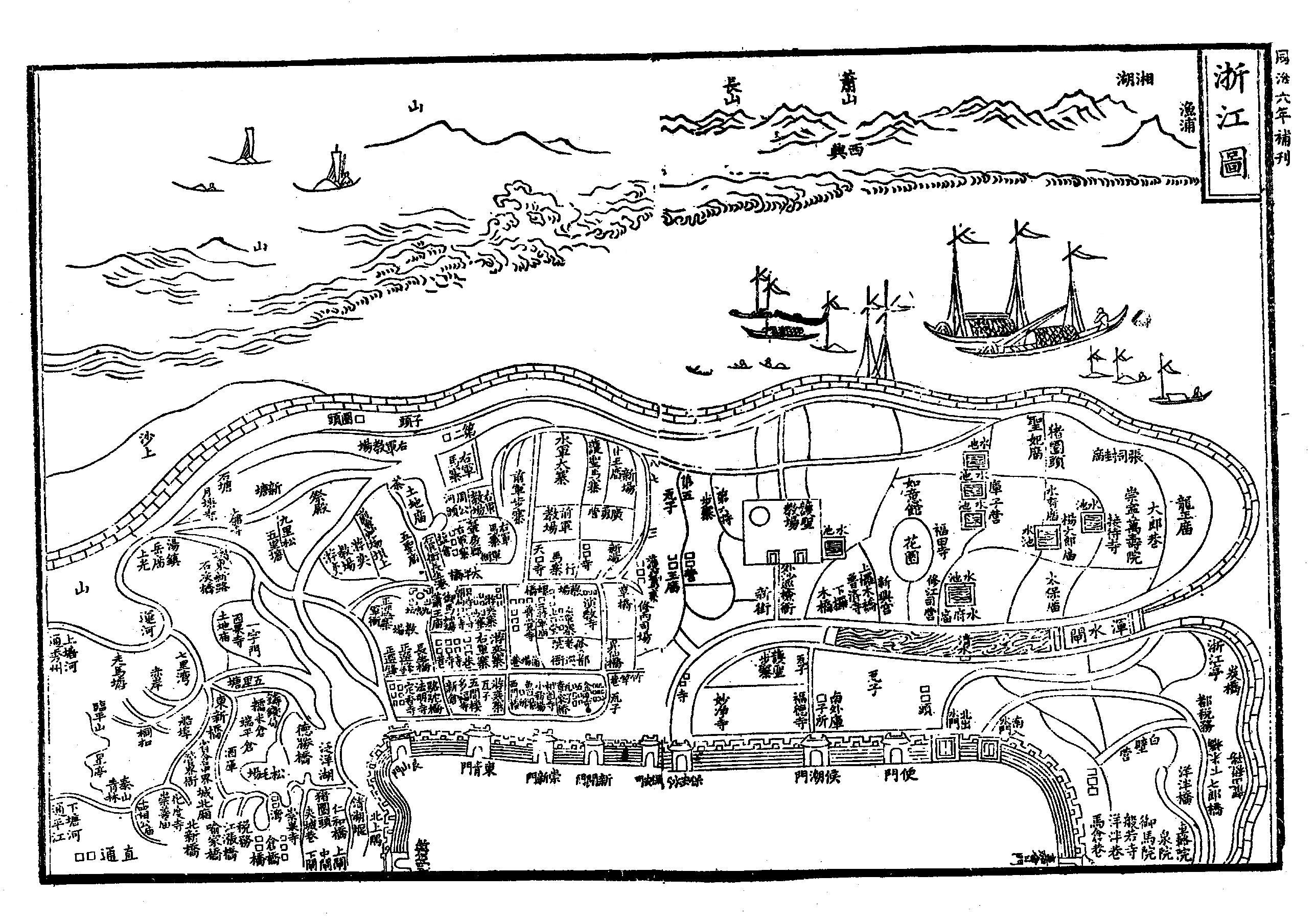 宋代钱塘江下游地图，扫描自《咸淳临安志》。